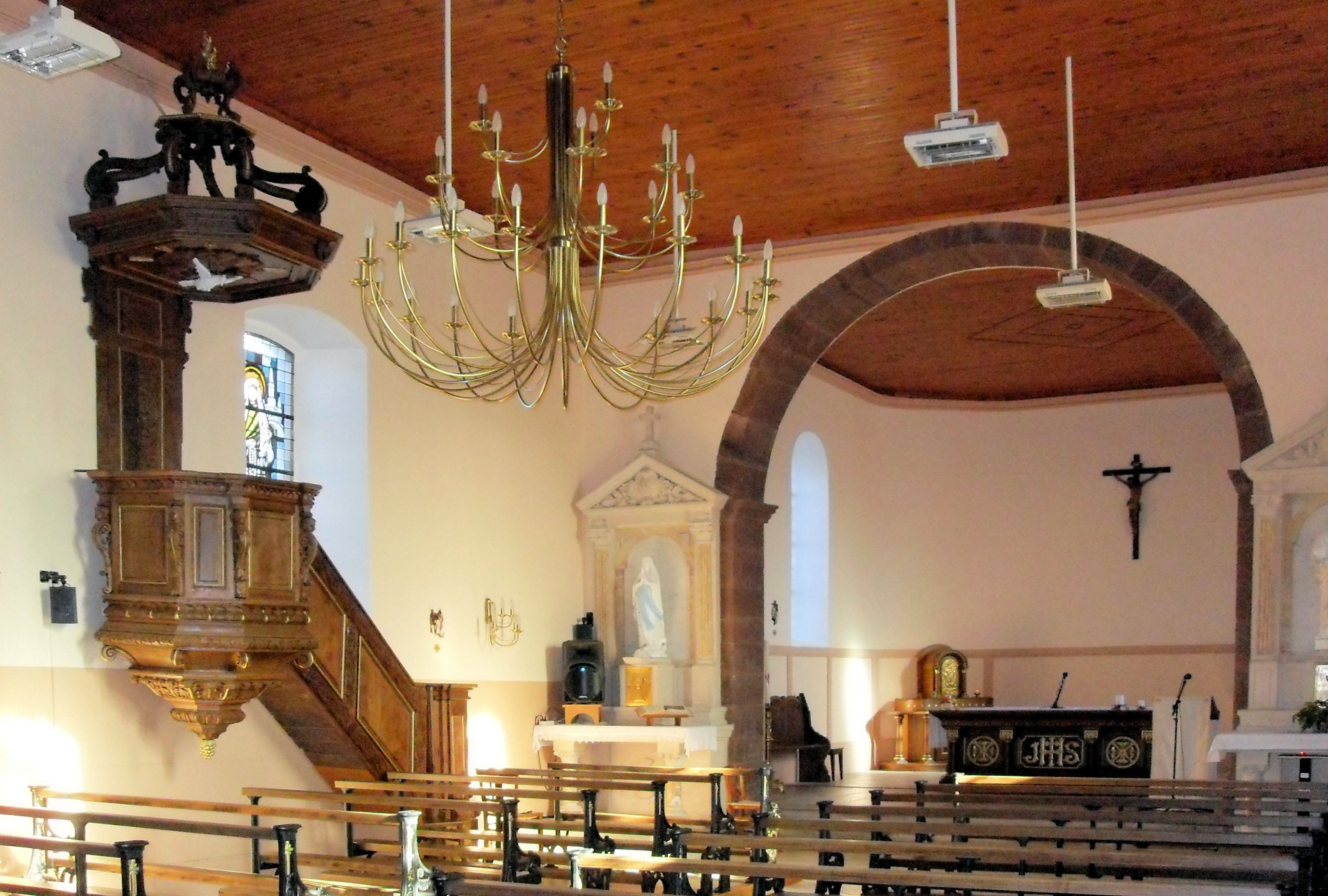 L'intérieur d'église Saint-Blaise à Reppe